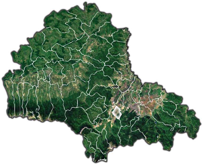 Cristian jud Brasov